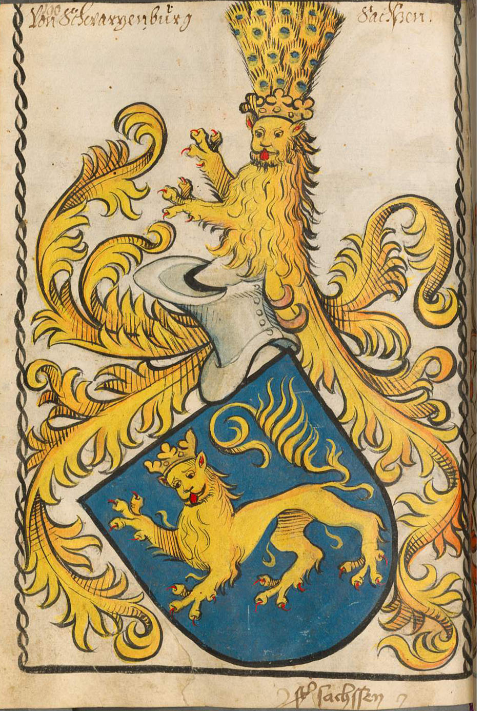 Wappen derer von Schwarzburg aus Scheibler'sches Wappenbuch , älterer Teil Sachsen, Seite 190